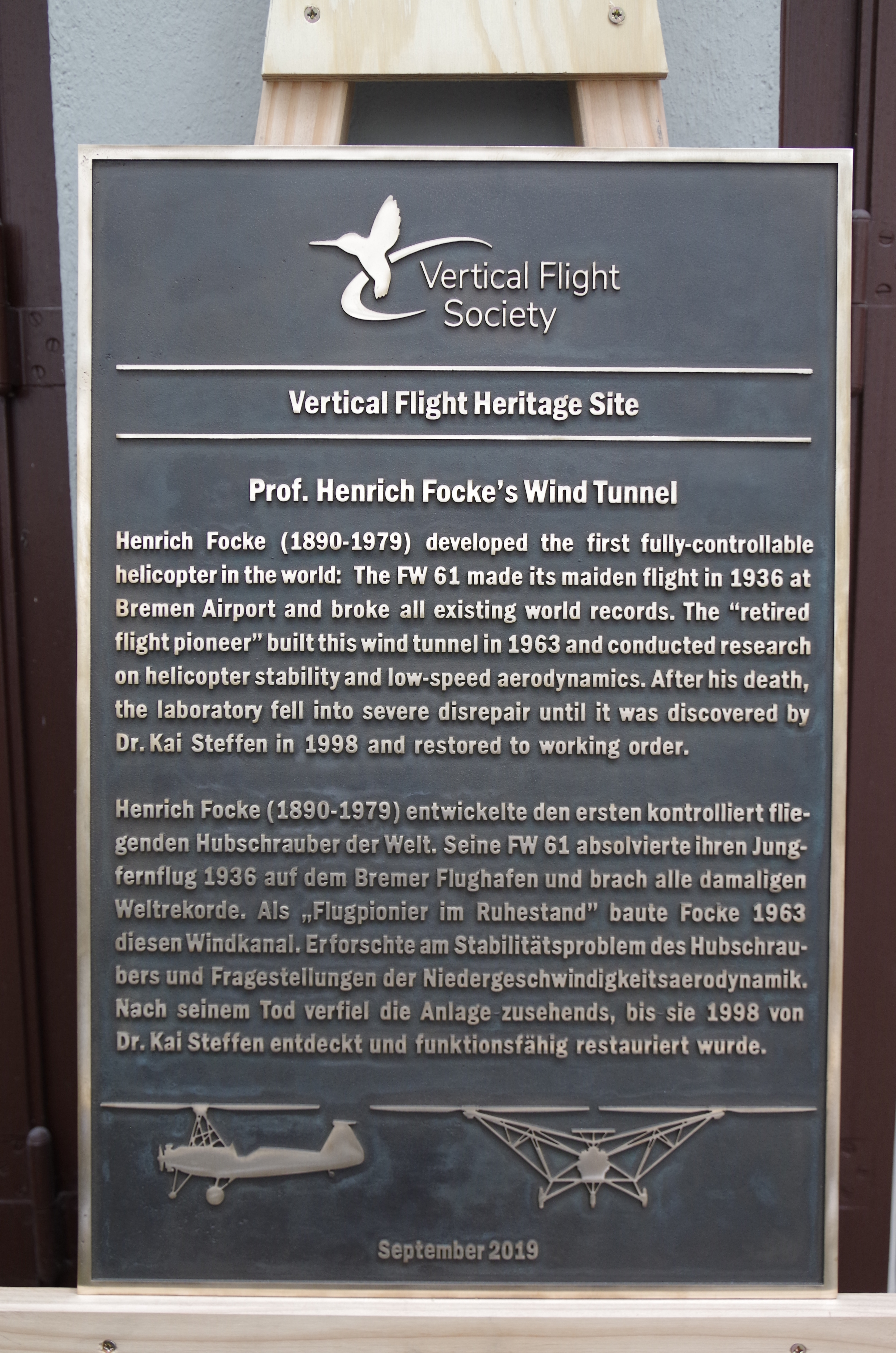 Gedenktafel am Focke-Windkanal zur Ernennung zur Vertical Fligth Heritage SiteDas abgebildete Objekt ist ein geschütztes Kulturdenkmal in der Freien Hansestadt Bremen, mit der Nr. 1157 beim Landesamt für Denkmalpflege registriert.